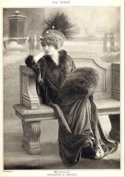 Geneviève Lantelme dans un manteau de velours rouge doublé de renard signé Jacques Doucet (1909).